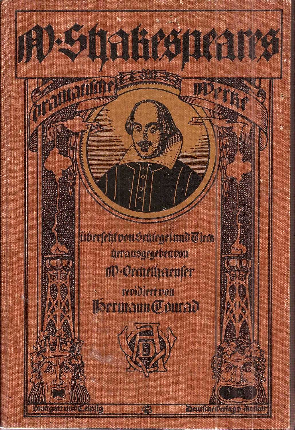 Opus of the Shakespeare's Schlegel-Tieck translation